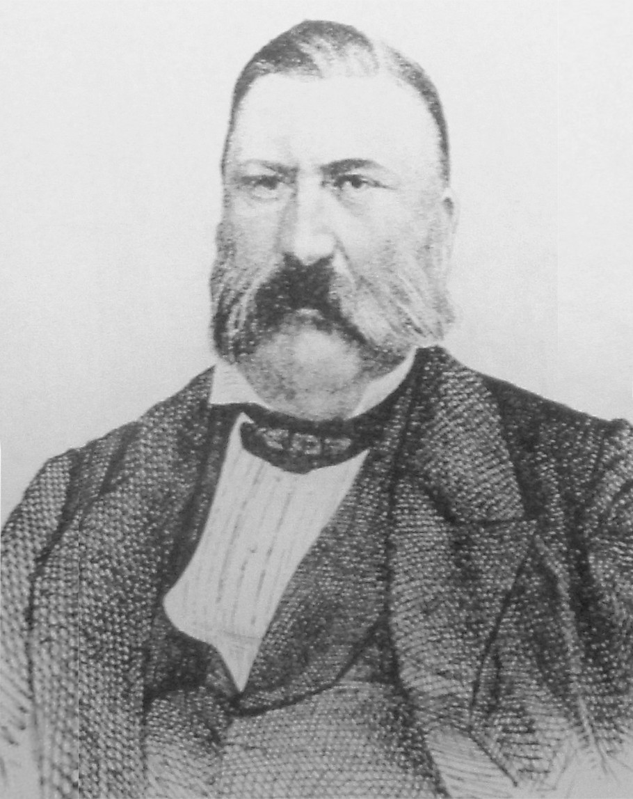 Arkitekt Georg Theodor von Chiewitz (1815-1862) enligt litografi av J F Meyer